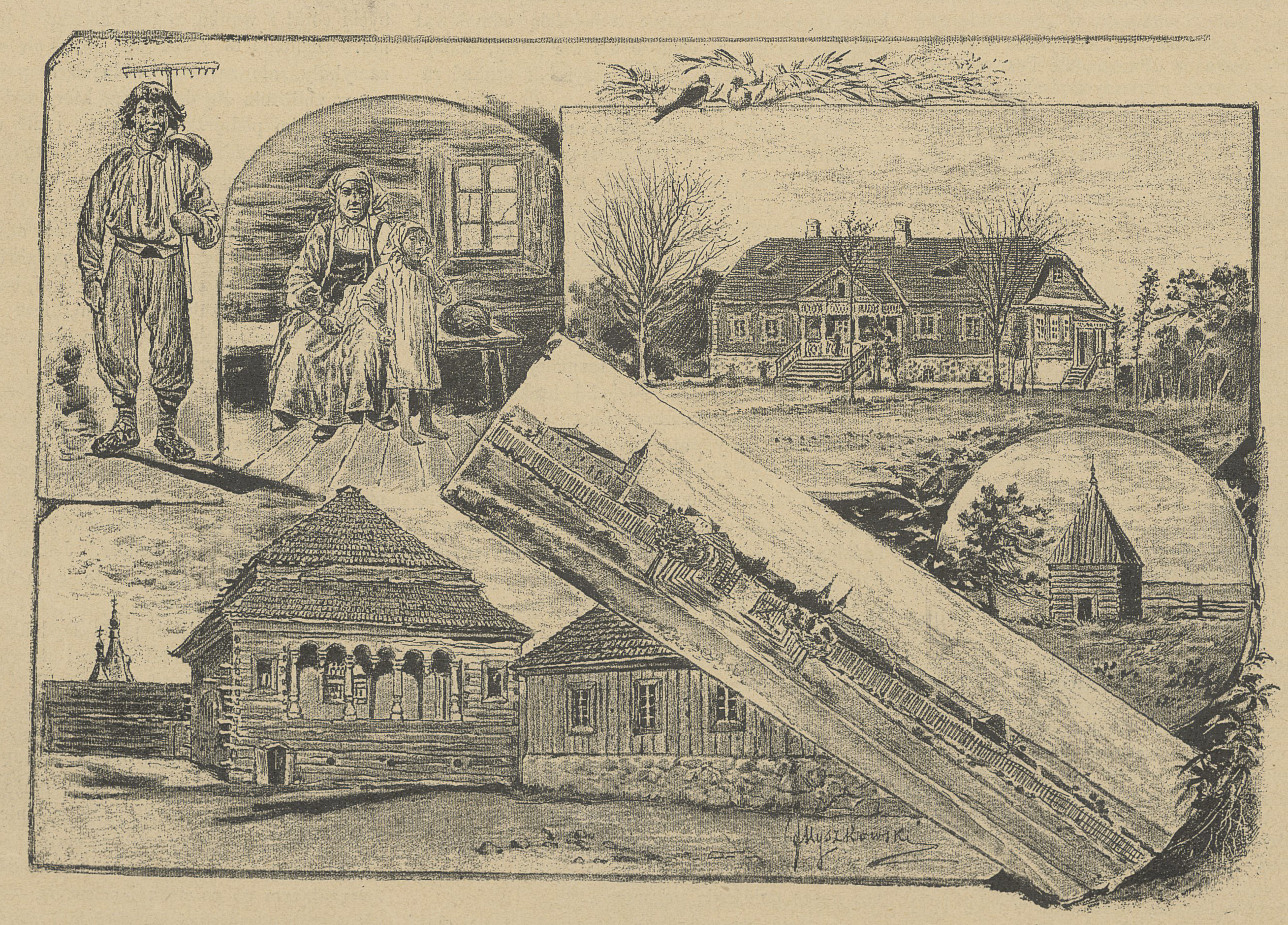 Беларуская (тарашкевіца): Маладэчна (Maładečna)